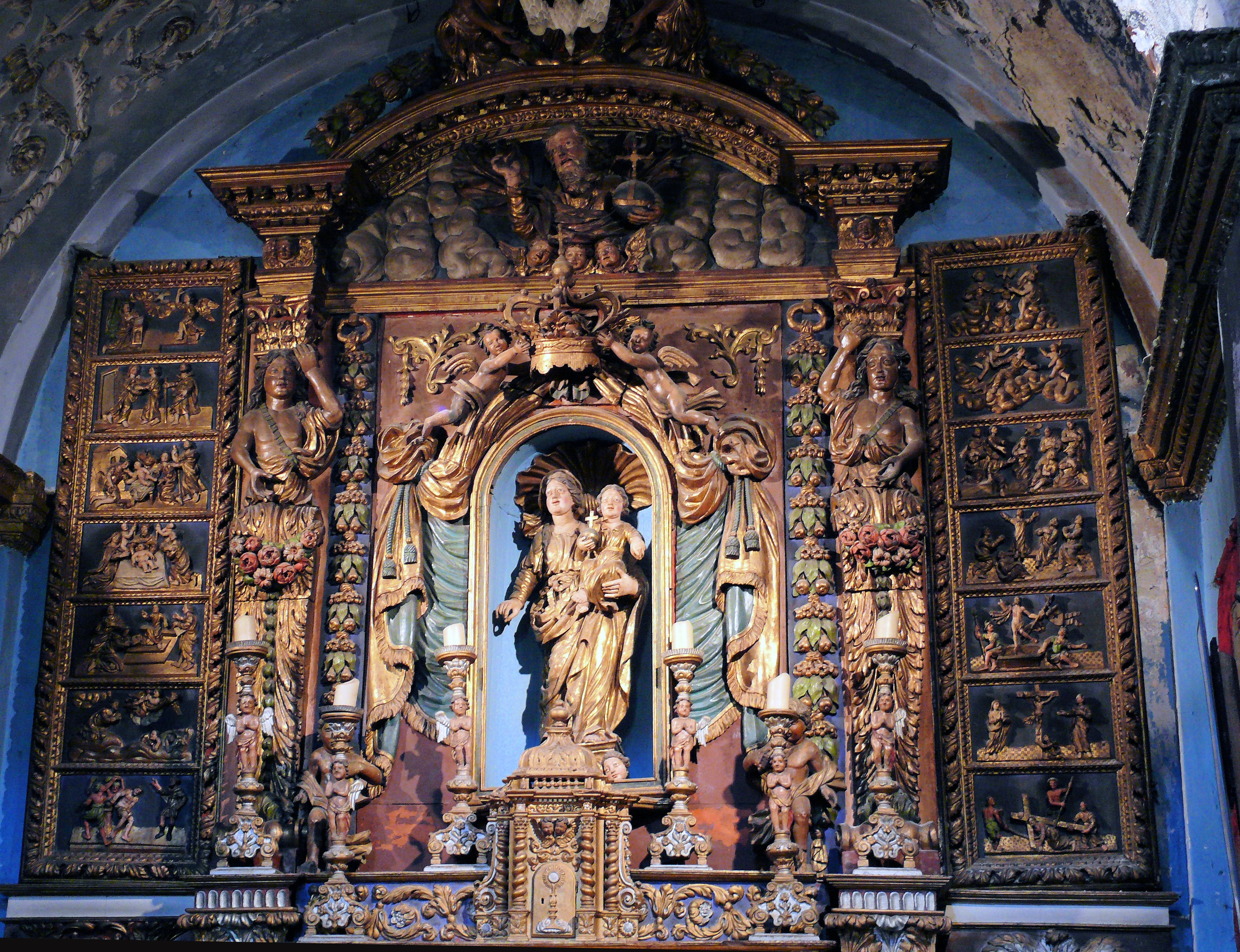 Saint-Martin-Vésubie - Église Notre-Dame-de-l'Assomption - Chapelle gauche - Retable du Rosaire de 1697